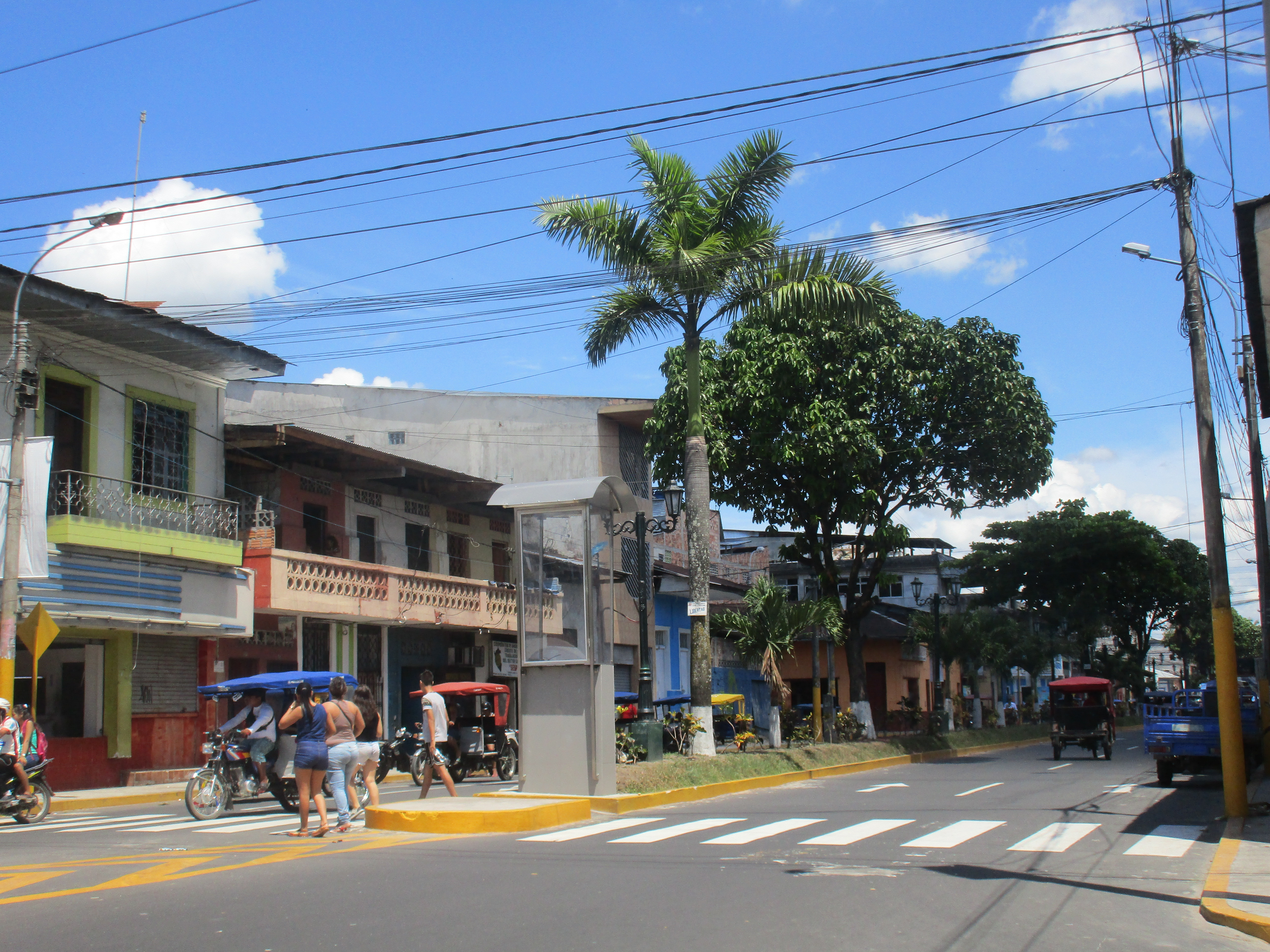 Avenida Miguel Grau en la ciudad de Iquitos, Perú.